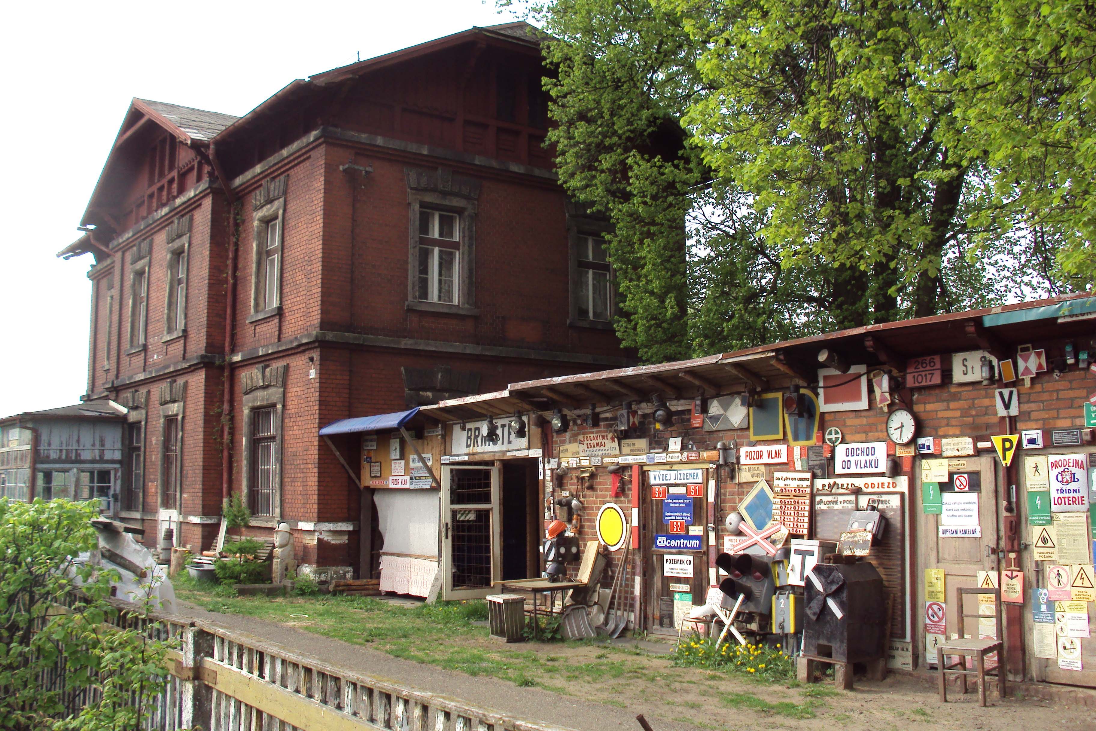 Staré nádraží je 20 metrů od novějšího, obě na katastru Hlemýždí u Brniště